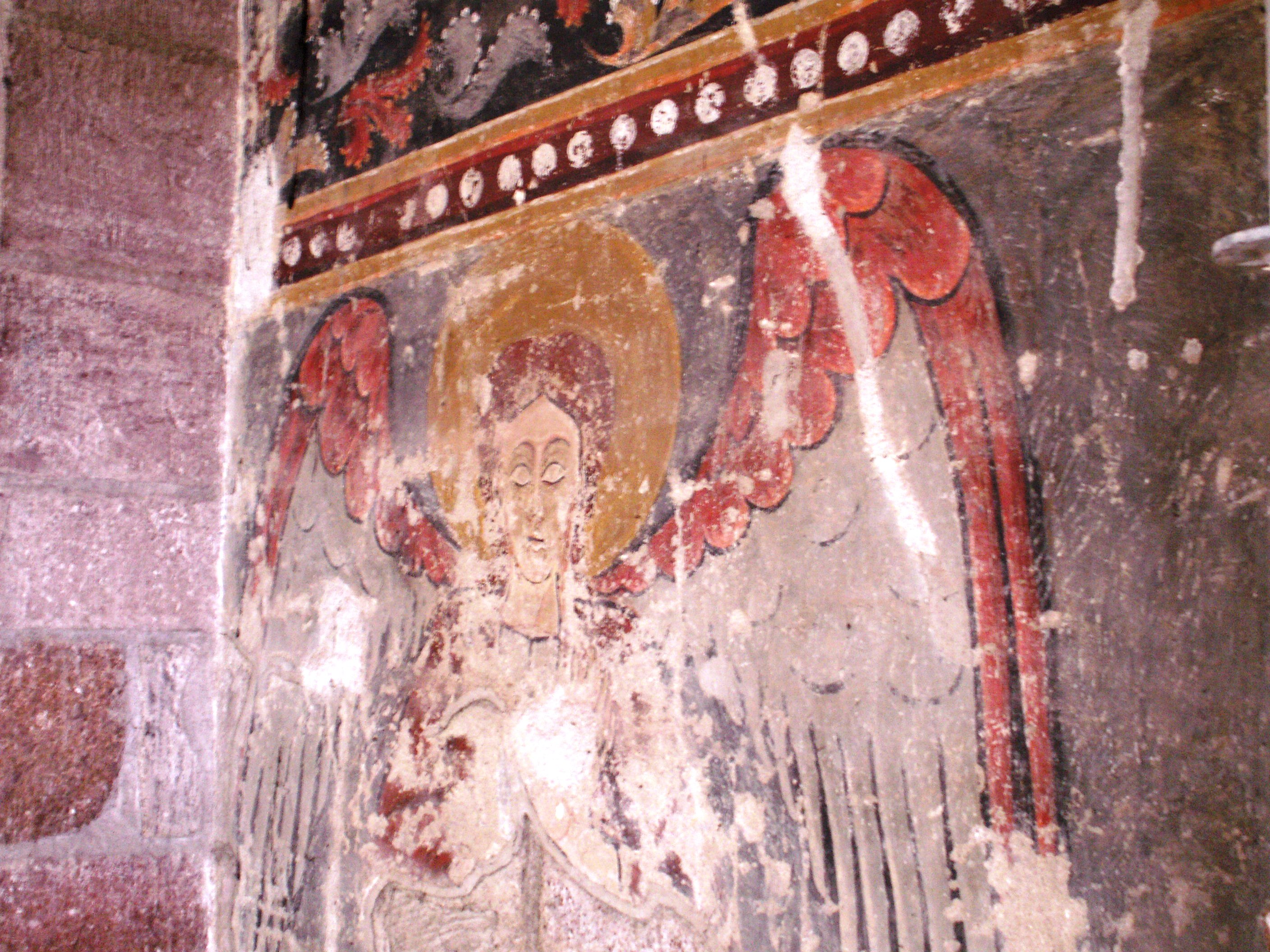 Devant la chapelle dite "Saint Michel" se trouve une représentation de Michel pesant les âmes